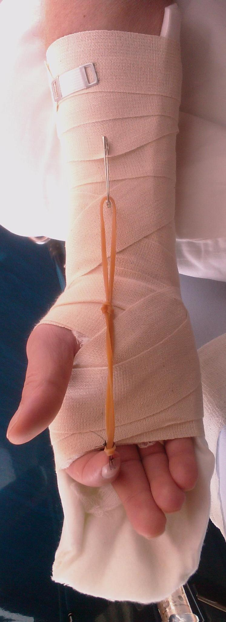 Nachbehandlung nach Kleinert einer Beugesehnen-Verletzung